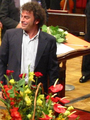 Foto di Luca Francesconi a Varsavia